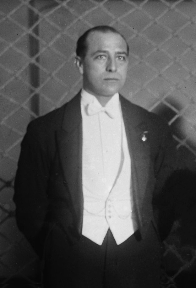 30-12-22, match France-Belgique, équipe de relais belge Victor Boin : [photographie de presse] / [Agence Rol]